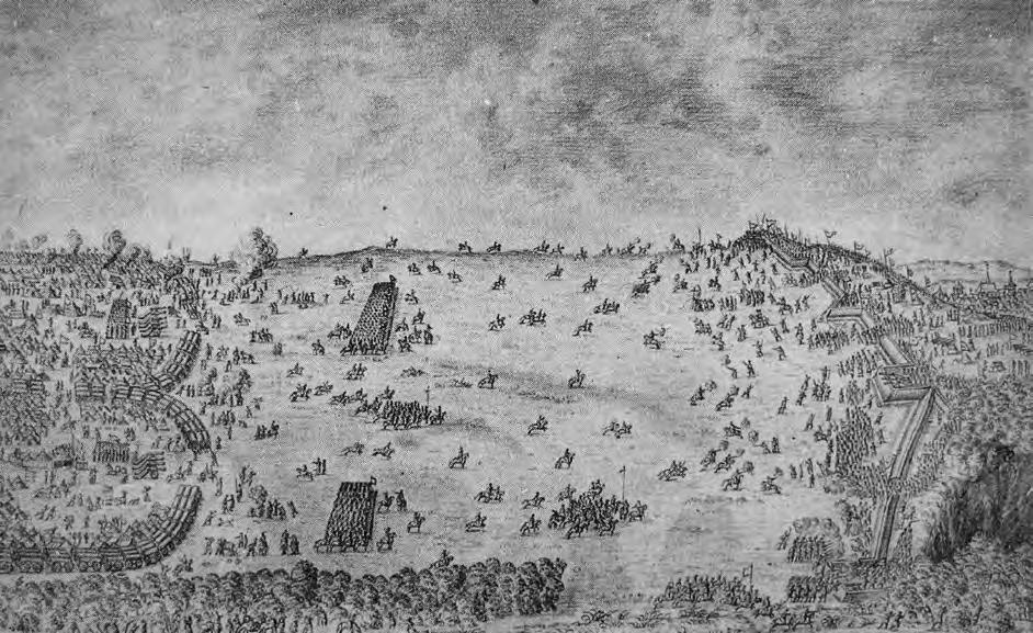 Битва под Белой Церковью. 24 сентября 1651 года.